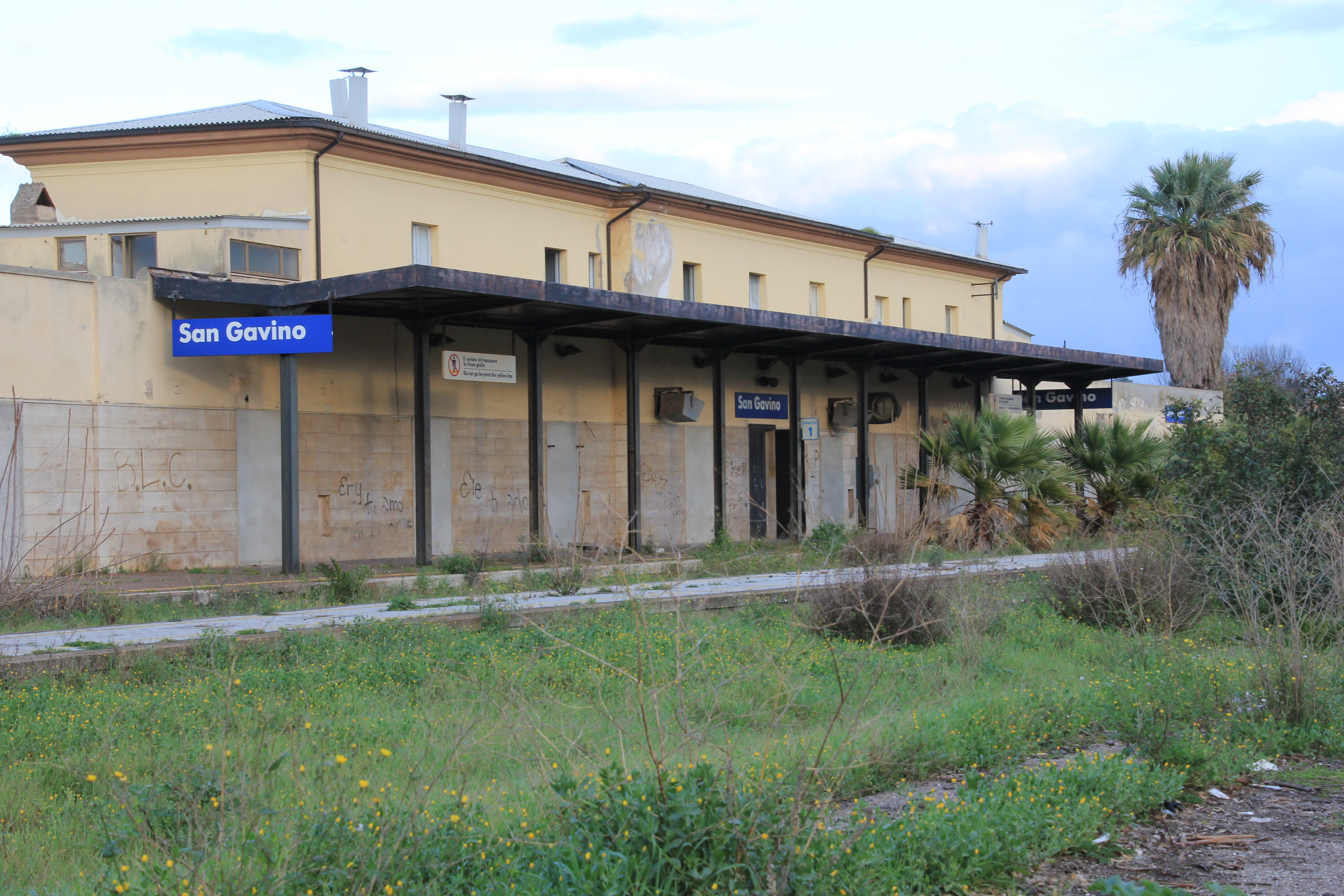 San Gavino Monreale - Stazione ferroviaria del 1871